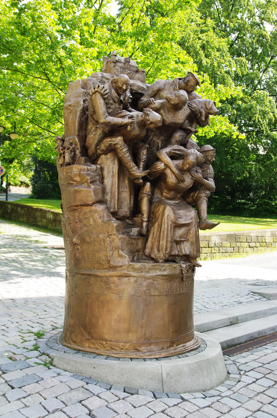 Weibertreu-Denkmal am Rathaus von Weinsberg